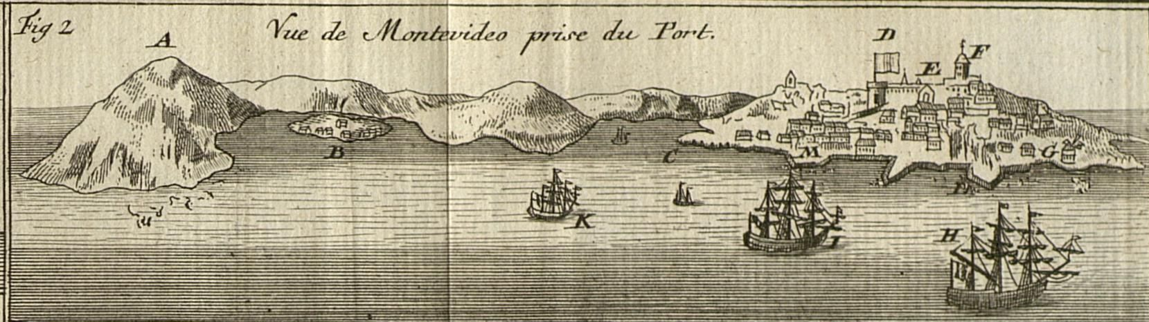 Autor: Pernety, Antoine-Joseph, 1716-1796 Descripción bibliográfica: Histoire d'un voyage aux Isles Malouines, fait en 1763 & 1764 : avec des obseruations sur le detroit de Magellan et sur les Patagons /par Dom Pernety ... ; tome premier [-second] . - Nouuelle édition, refondue & augmentée ... - A Paris : chez Saillant & Nyon .... : Delalain ... : de l'imprimerie de Le Breton ..., 1770 . - 2 v. (I: IV, 385 p., [1] p. en bl. ; II: [2], 334 [2] p., XVI [i.e. XVIII] h. de grab. pleg.) ; 8º Notas: Nombre del tercer impresor tomado del colofón del t. 2. - Sign.: I: ², A-2A⁸, 2B² ; II: ¹, A-X⁸. - Error de numeración de las h. de grab., se repiten las VIII y IX. - Las h. de grab. pleg. son calc. con mapas, animales, plantas ... Impresor: Nyon, Jean Luc, imp. Impresor: Saillant, Charles,1716-1786, imp. Impresor: Delalain Nicolas-Augustin, ca 1735-1807, imp. Impresor: Impreimerie de Le Breton, imp. Lugar de impresión: Francia. París Localización: Vea la ilustración en su contexto Libro completo en pdf